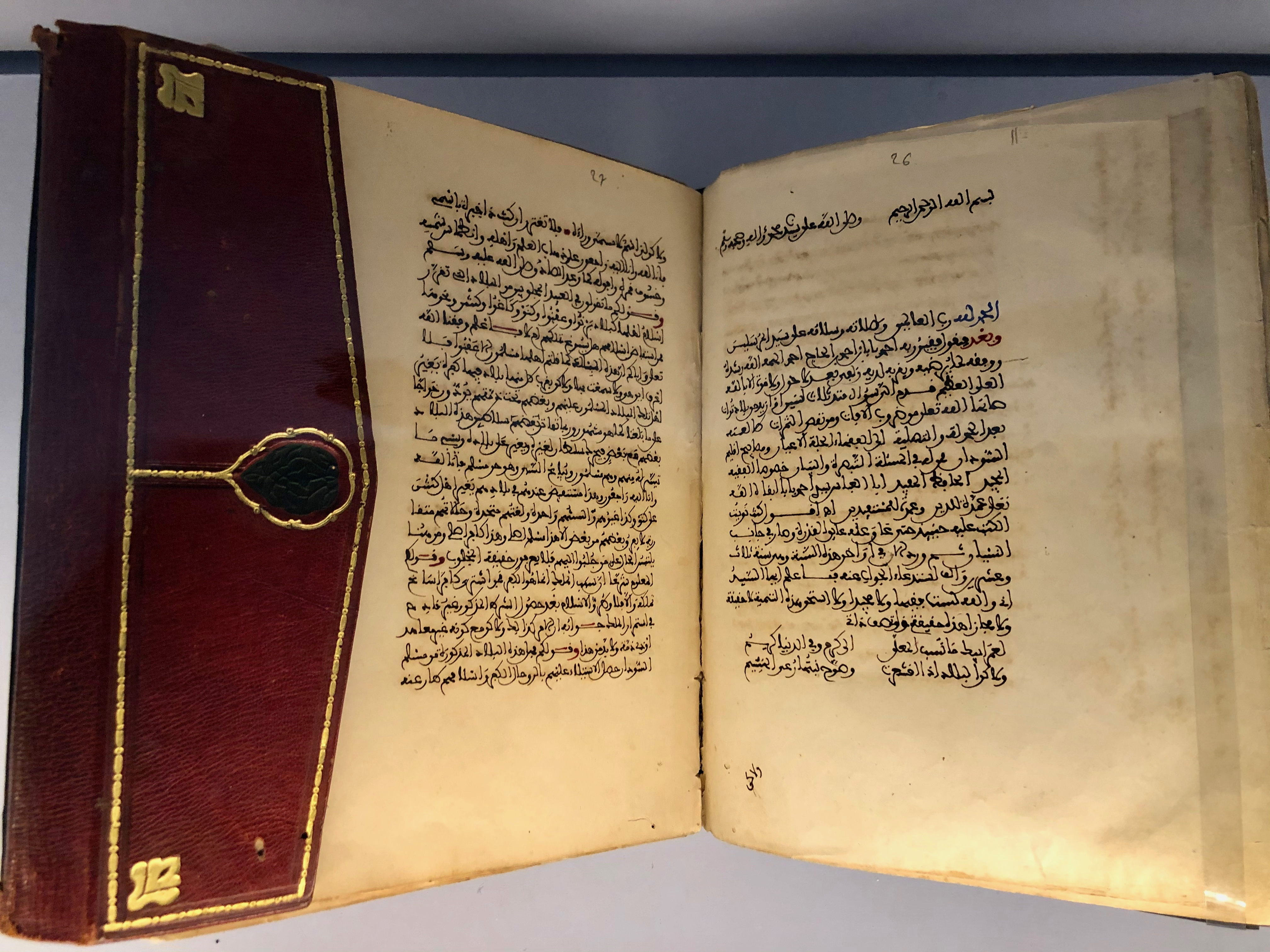 مخطوطة لكتاب "معراج الصعود إلى نيل حكم مجلب السود" لأحمد بابا الصنهاجي التمبكتي يجيب فيه على أسئلة المغاربة عن الاسترقاق في بلاد السودان. مخطوطة على ورق كتبت عام 1882. خزانة المكتبة الوطنية للمملكة المغربية. من معرض كنوز الإسلام في إفريقيا بمتحف محمد السادس للفن الحديث والمعاصر بالرباط، عام 2019